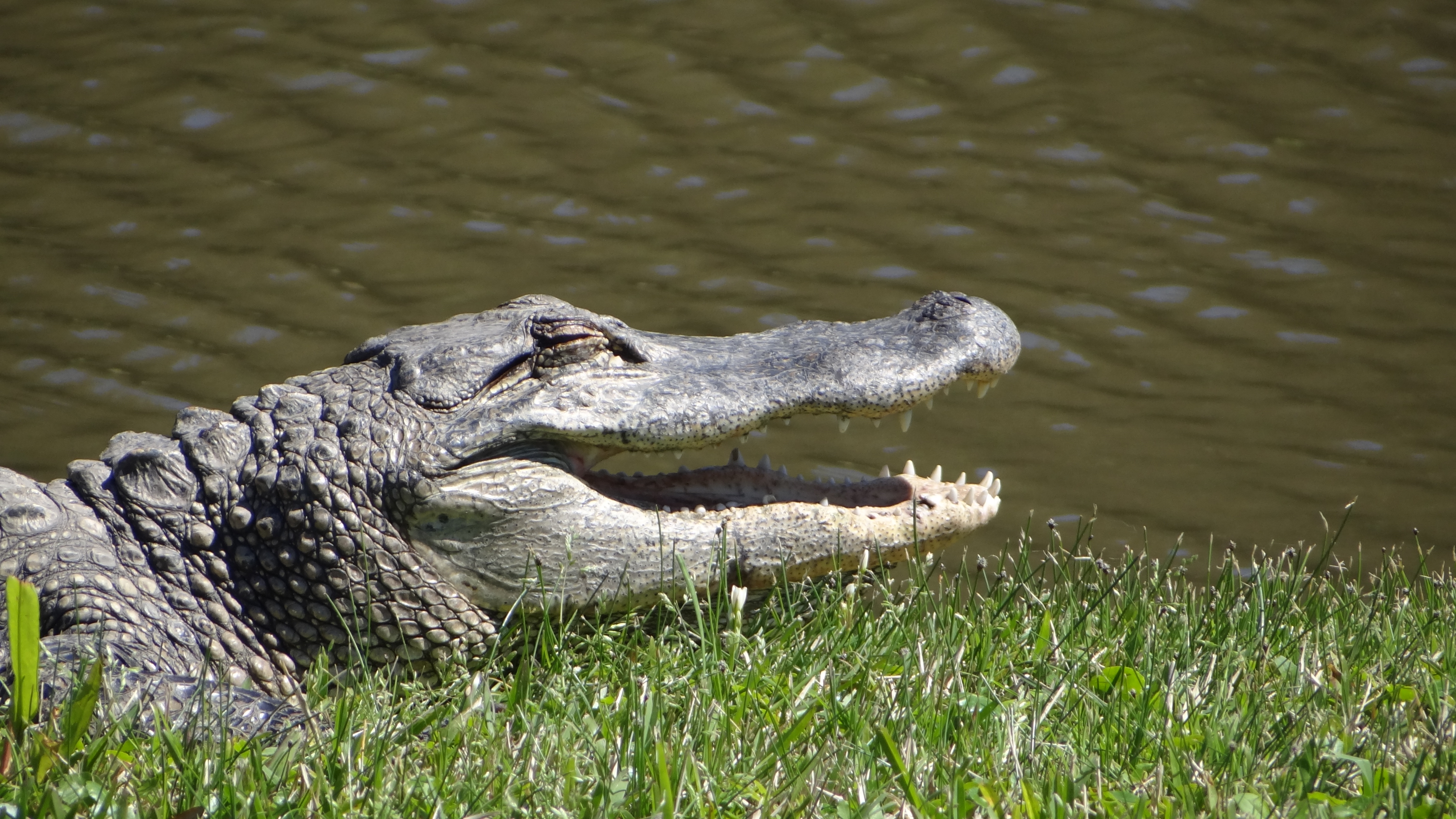 Avery Island et Tabasci, Louisiane, USA